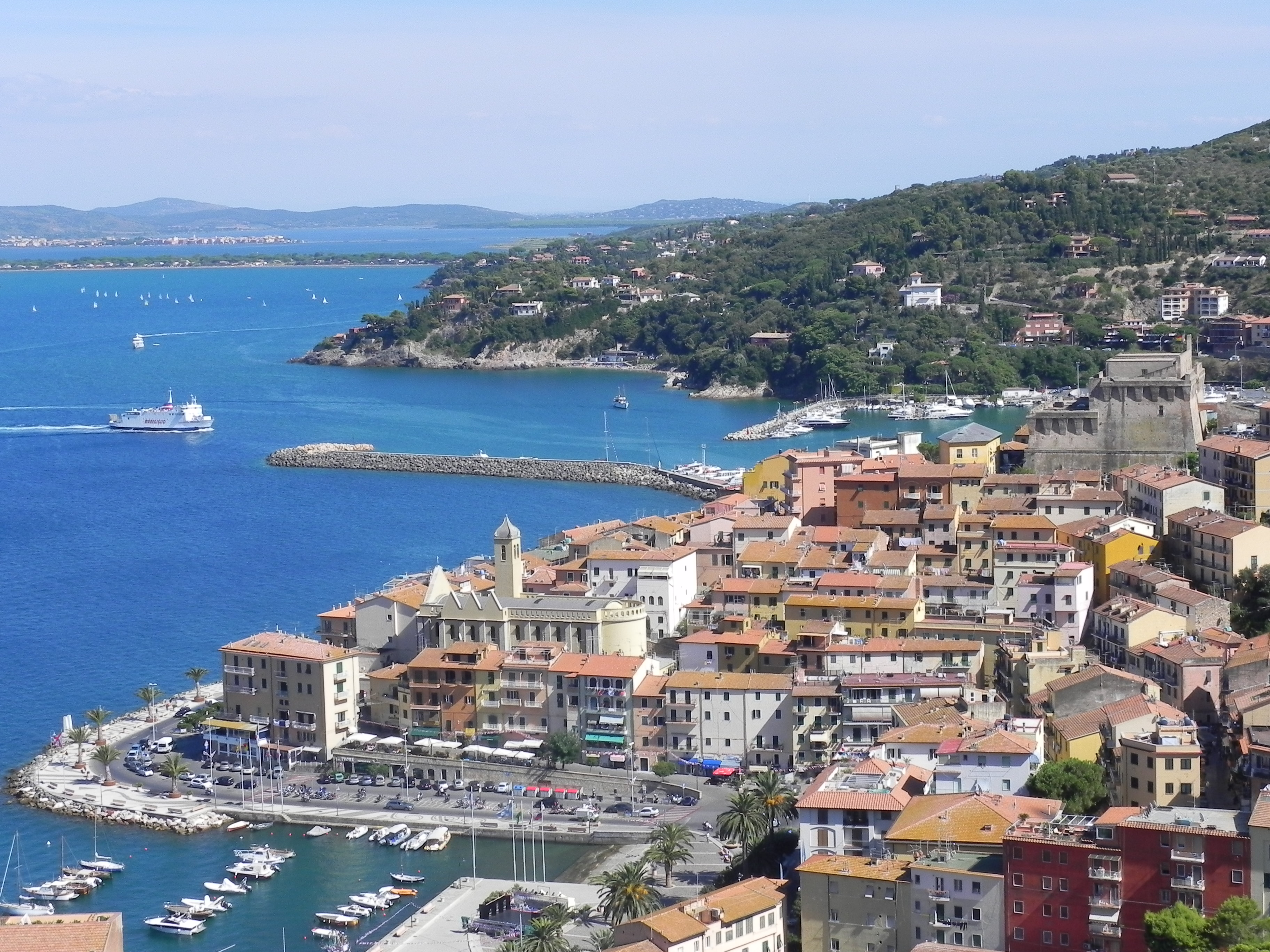 Panorama di Porto Santo Stefano: sullo sfondo si delineano i tomboli che uniscono l'Argentario alla terraferma.